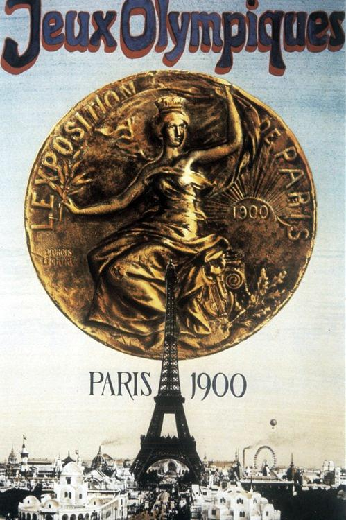 Affiche Jeux Olympiques Paris 1900.